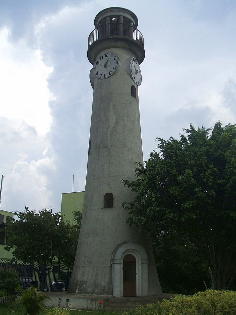 O Relógio do Jaguaré, mirante localizado no distrito homônimo da cidade de São Paulo, Brasil